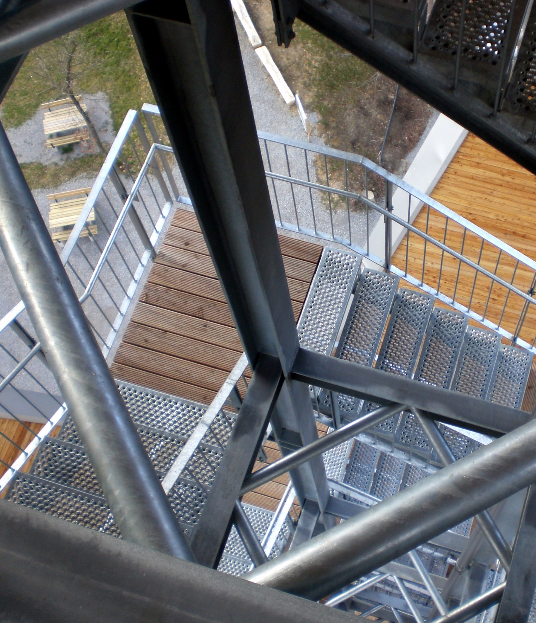 Der Altenbergturm in Sulzbach-Laufen, Treppe. Blick Richtung Nordwesten. Die Treppenplattformen sind mit gerilltem Holz belegt, die Treppenstufen sind aus gelochten Edelstahlplatten. Bei Aufstieg während Tauwetters kann es merklich tropfen. Der Turm war bisher stets geöffnet, für das Betreten bei Schnee und Eis weist dem Besucher aber ein Schild jede Verantwortung selber zu.